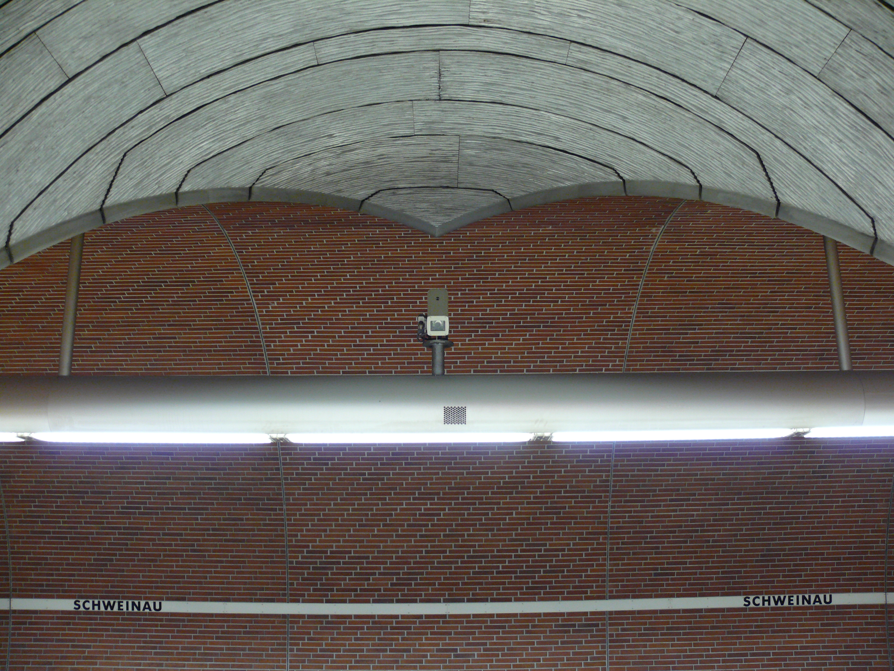 Blick vom Querschlag in eine Tunnelröhre am U-Bahnhof Schweinau in Nürnberg und das Wechselspiel der roten Spaltriemchen in den Tunnelröhren mit den Aluminiumplatten in dem Tunnelquerschlag.